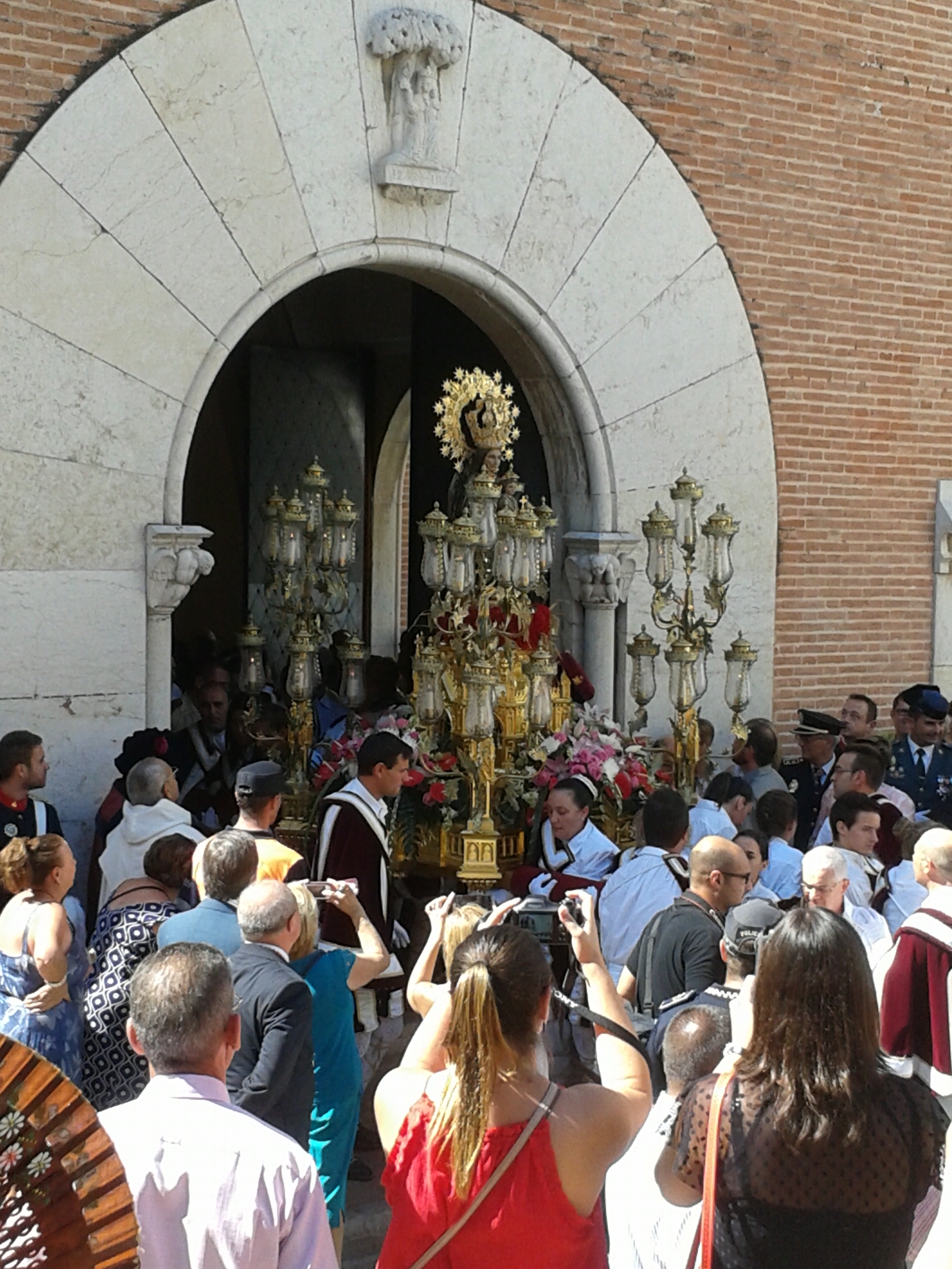 Mare de déu de la Salut en la capella